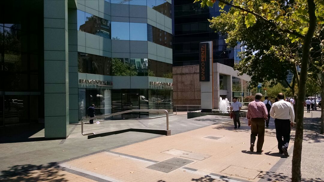 Banco Penta en Santiago, Chile.